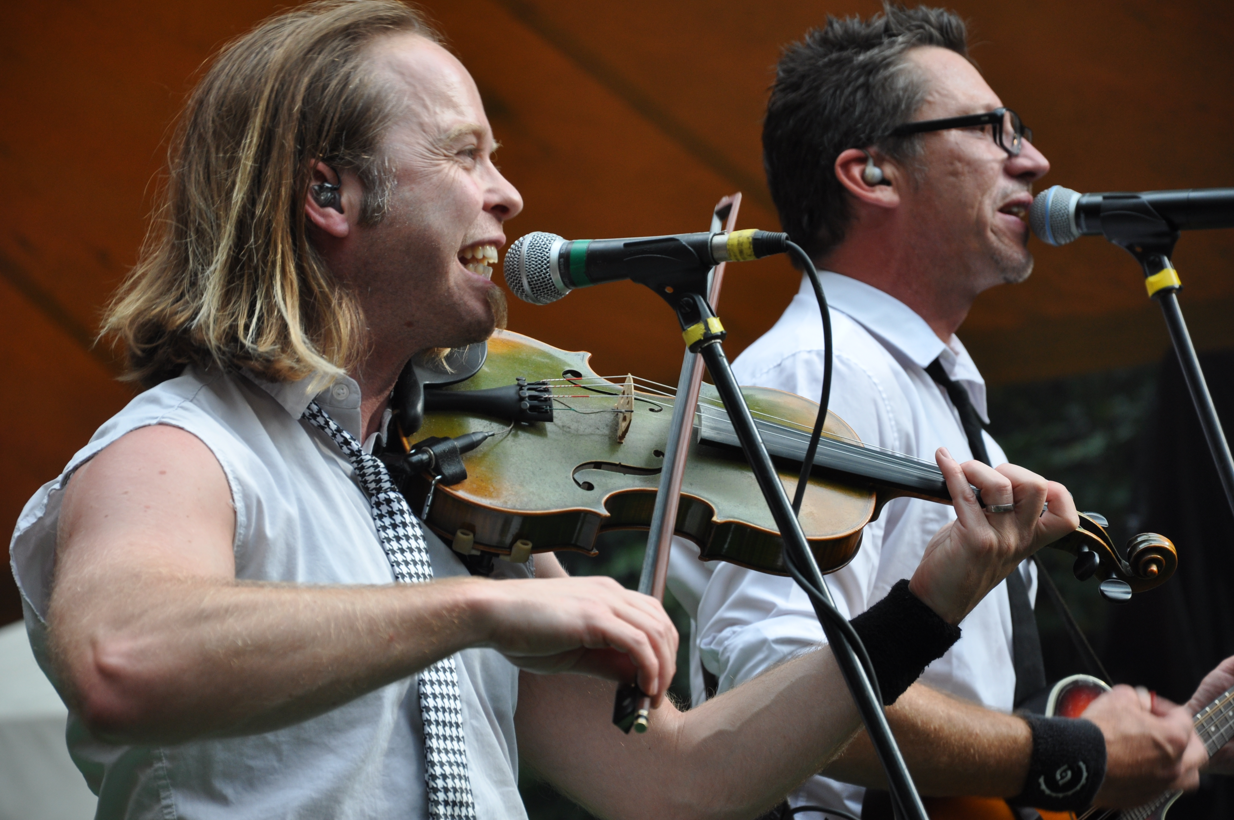 Feuertal 2013 in Wuppertal auf der Waldbühne Hardt: Fiddler’s Green